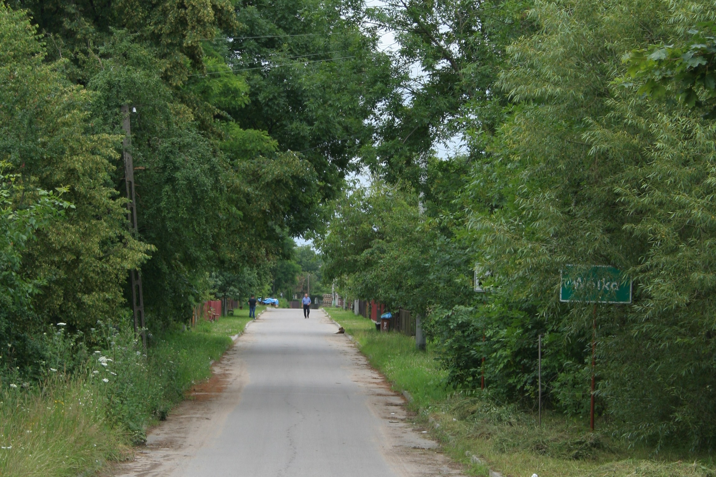 Droga wjazdowa do Wólki.